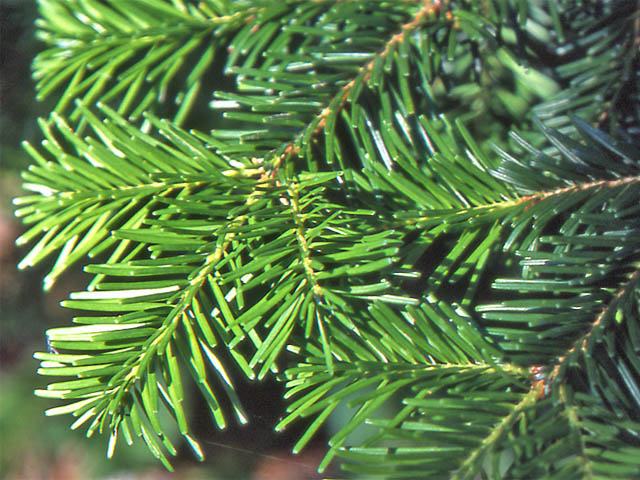 Hojas de Abies veitchii en Senjyou-dake, Sierra Akaishi, Japon. シラビソの葉、南アルプス仙丈岳にて撮影